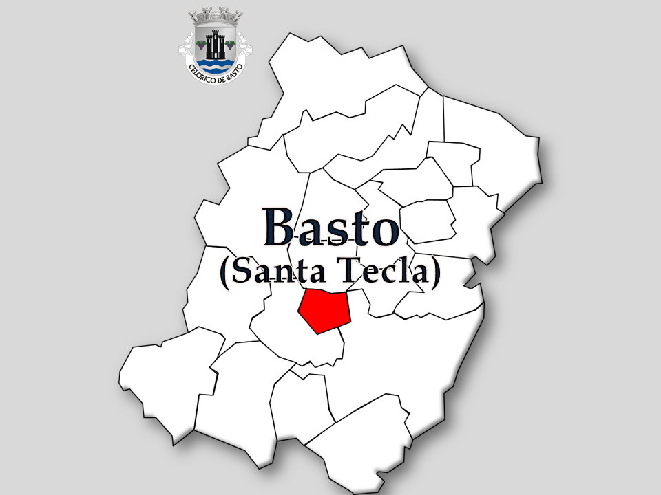 Censos 1864/2011